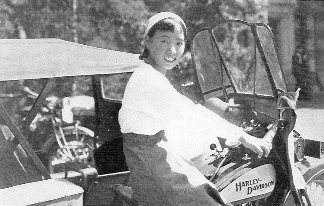 水上飛行家松本菊子（西崎キク）の写真。